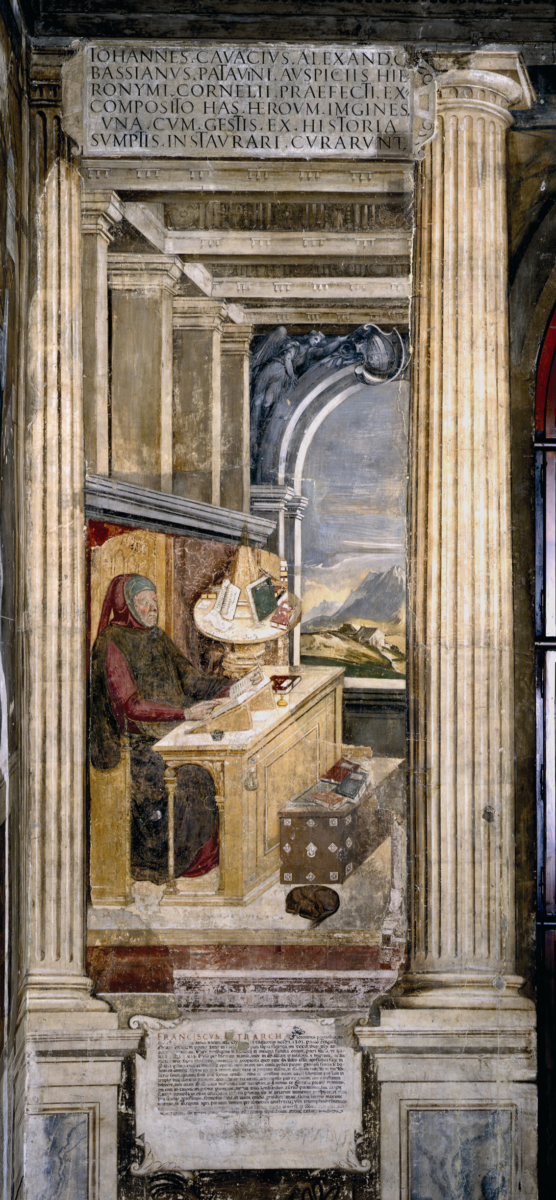 Anonimo, ultimo quarto del sec. XIV - Francesco Petrarca nello studio - Padova, Sala dei Giganti